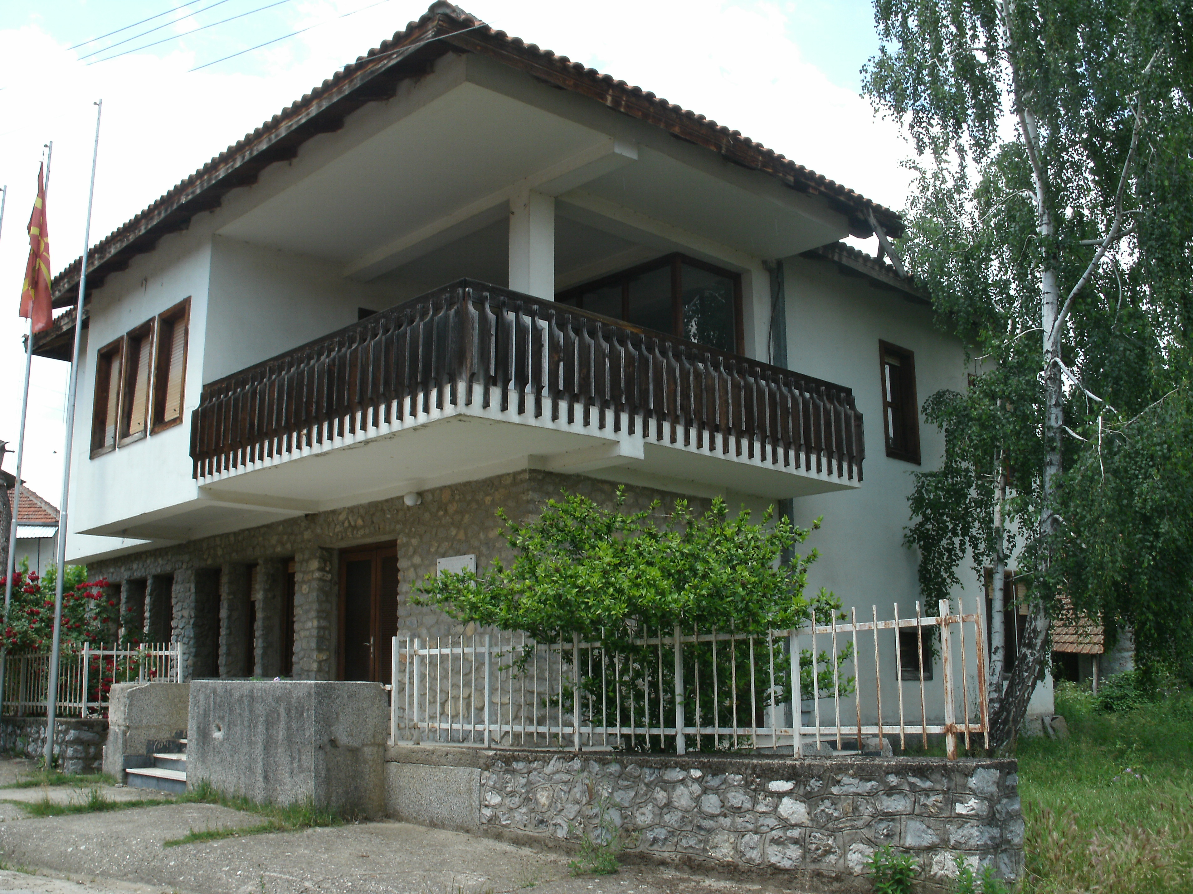 Куќата на Петар Поп Арсов во Богомила